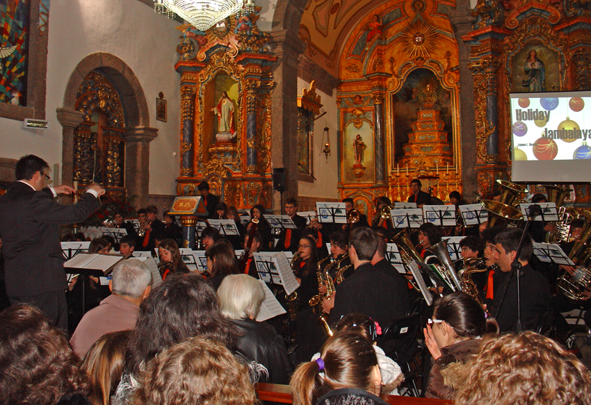 Concerto de Natal da Banda Filarmónica de São João de Areias - Dezembro de 2011